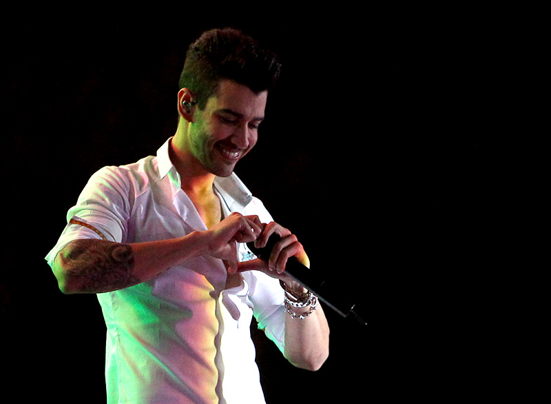 Gusttavo Lima, nome artístico de Nivaldo Batista Lima (Presidente Olegário, 3 de setembro de 1989), é um cantor, compositor e instrumentista brasileiro de música sertaneja, durante participação na FIFA Fan Fest, em Taguatinga, DF.